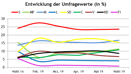 Europawahl 2019 Schweden Umfragen